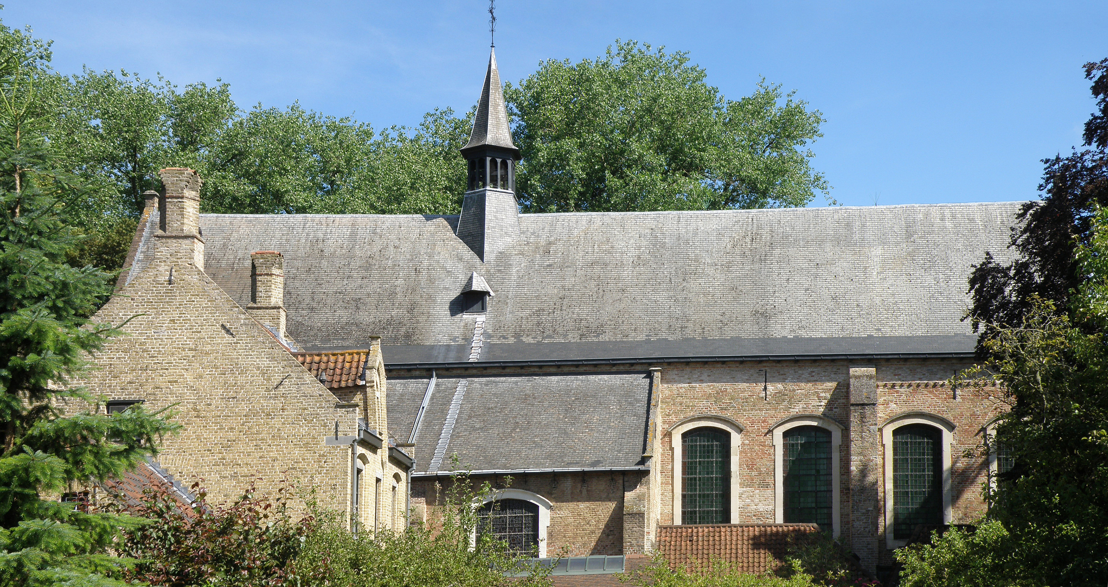 Bruges (Belgique). Église Sainte-Élisabeth-au-Béguinage, flanc sud. À gauche (brique jaune), maison béguinale n°7.